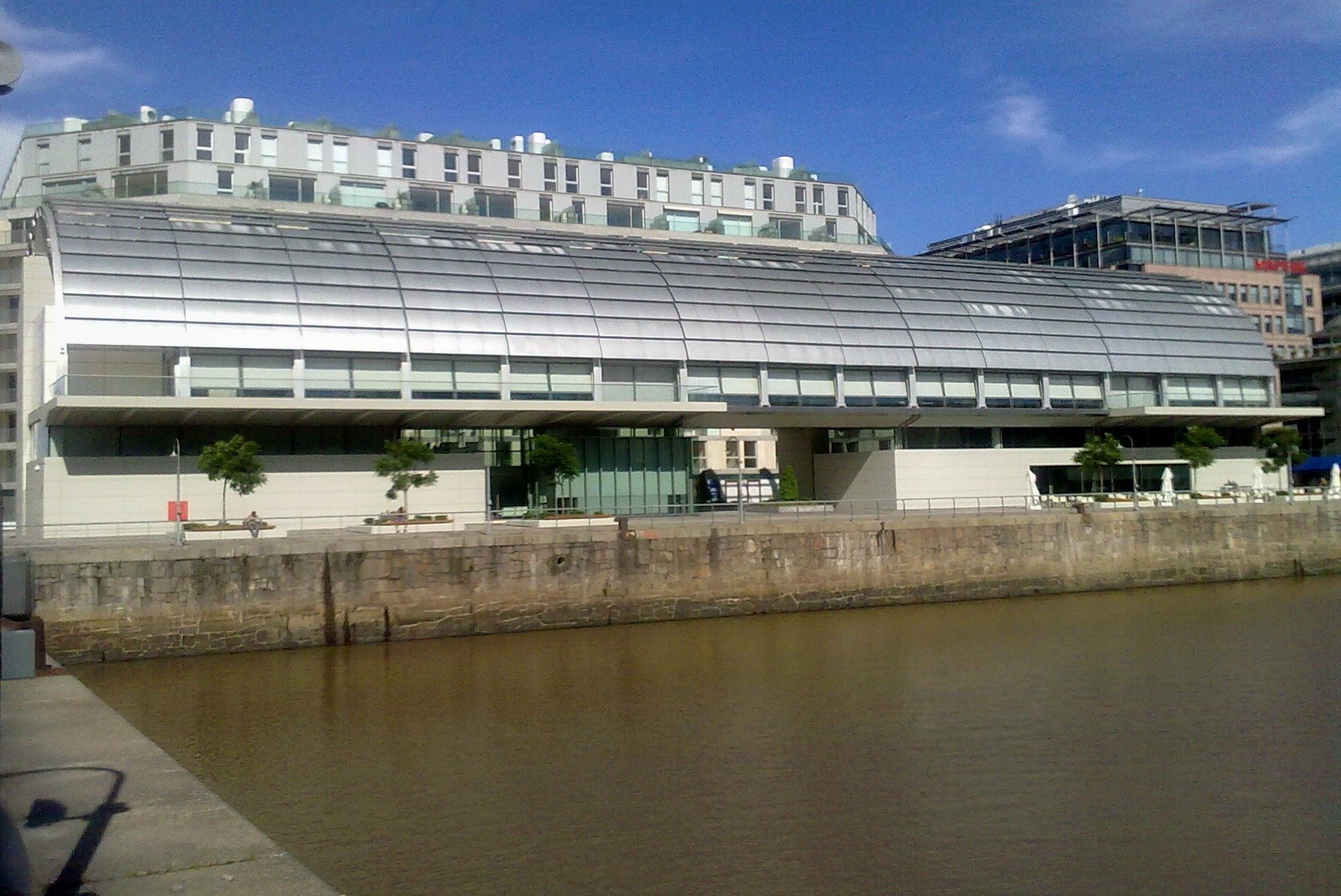 Parte trasera del Museo de Arte Amalia Lacroze de Fortabat, en Puerto Madero, Buenos Aires, Argentina.